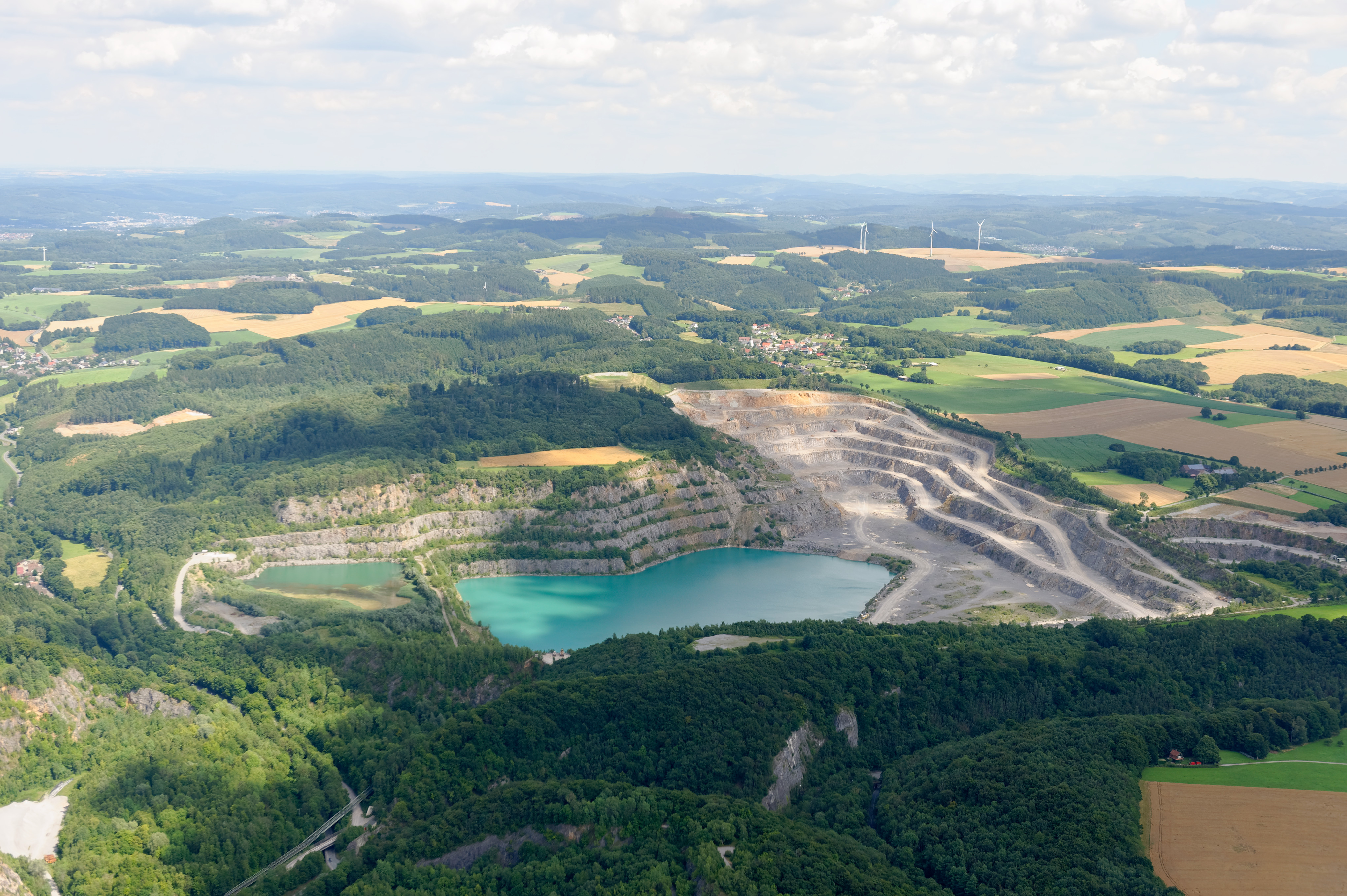 Luftaufnahme: Blick nach Osten übers Hönnetal (unten im Bild) und die Rheinkalk-Steinbrüche Asbeck und Horst (Stadtgebiet Balve), im Hintergrund (oben) überwiegend Stadtgebiet Arnsberg; Nordrhein-Westfalen